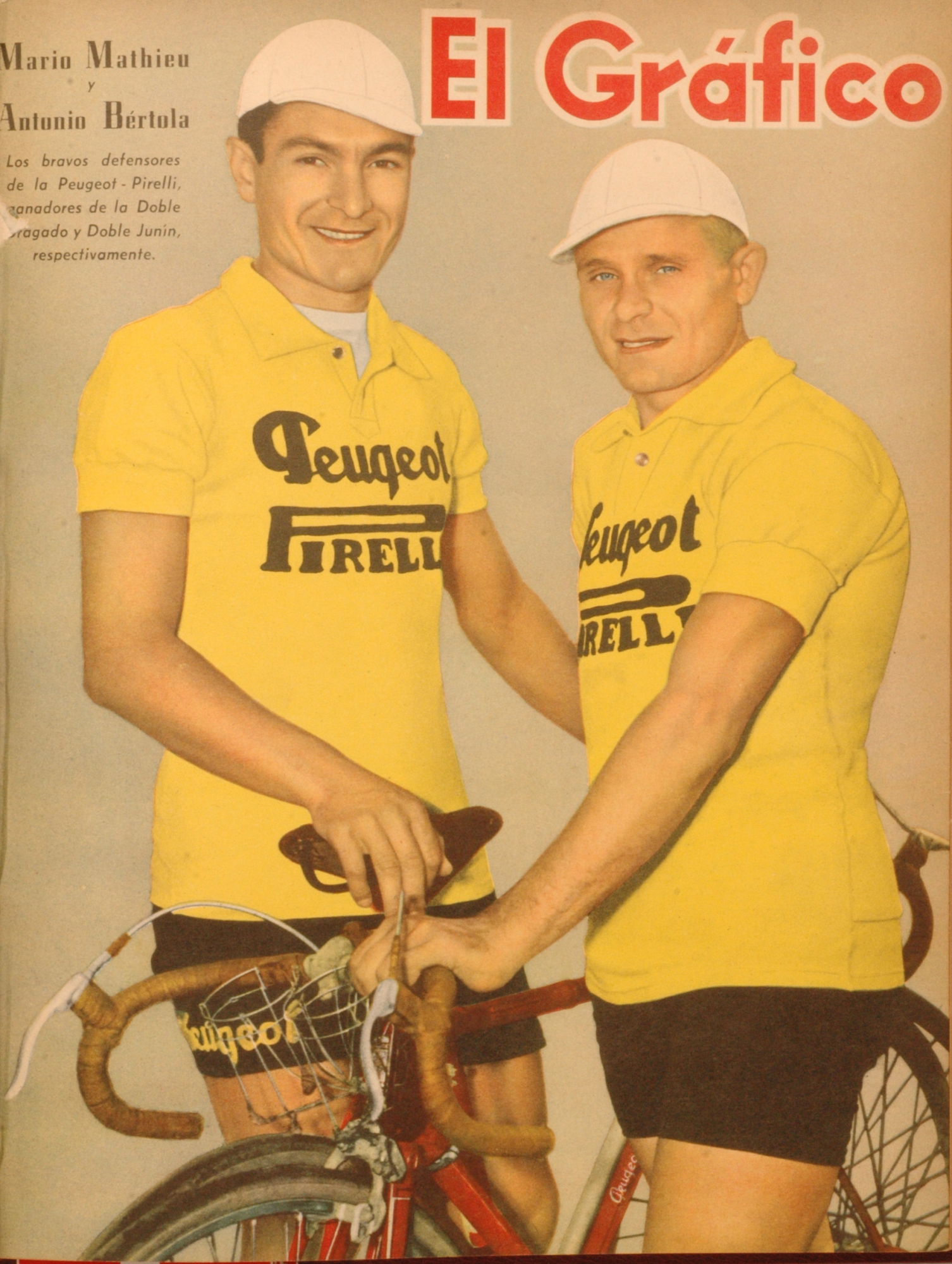 El Grafico del 25 de Diciembre de 1942. Edicion 1224